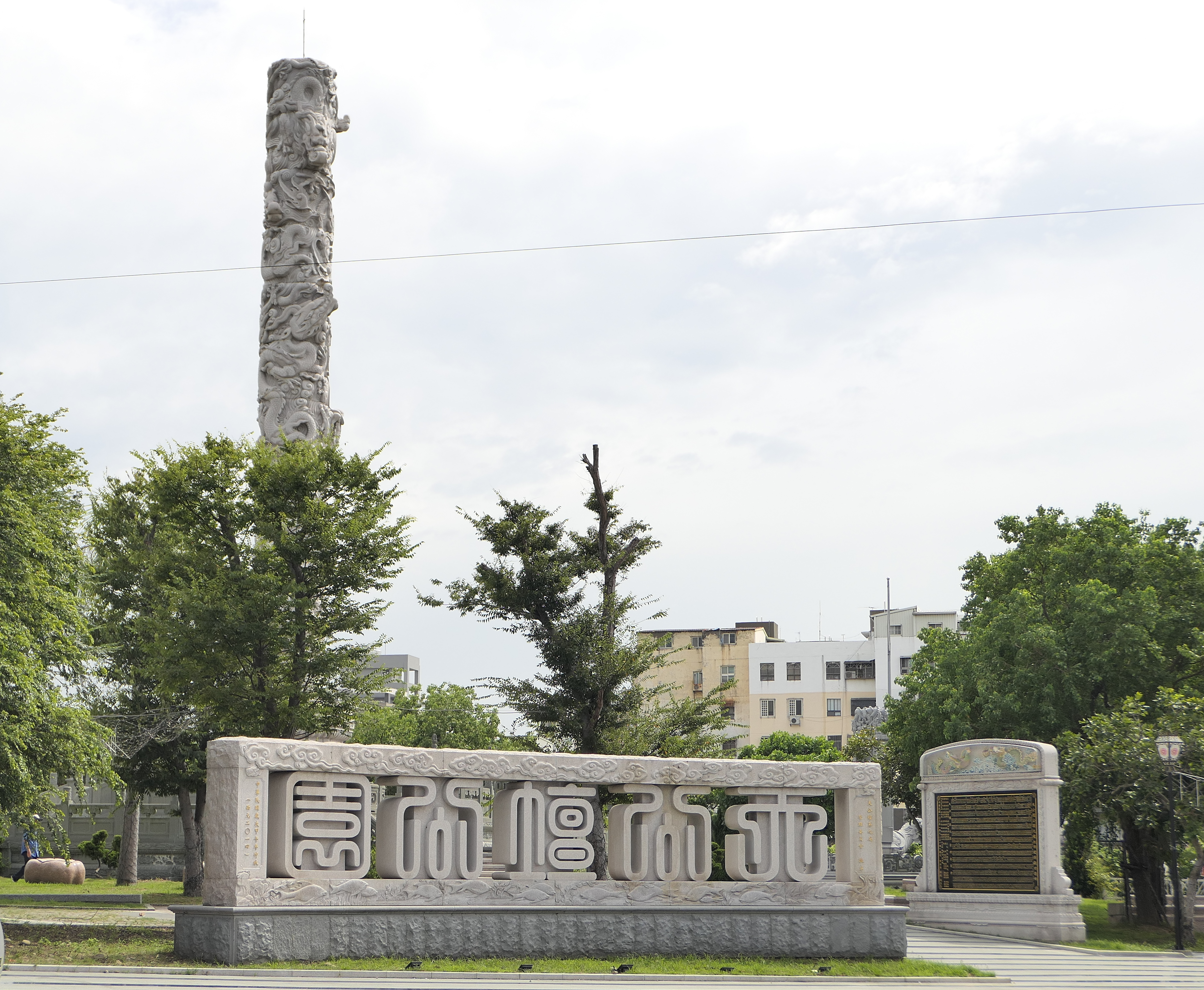 中文（台灣）: 新竹天公壇旁的天公壇公園